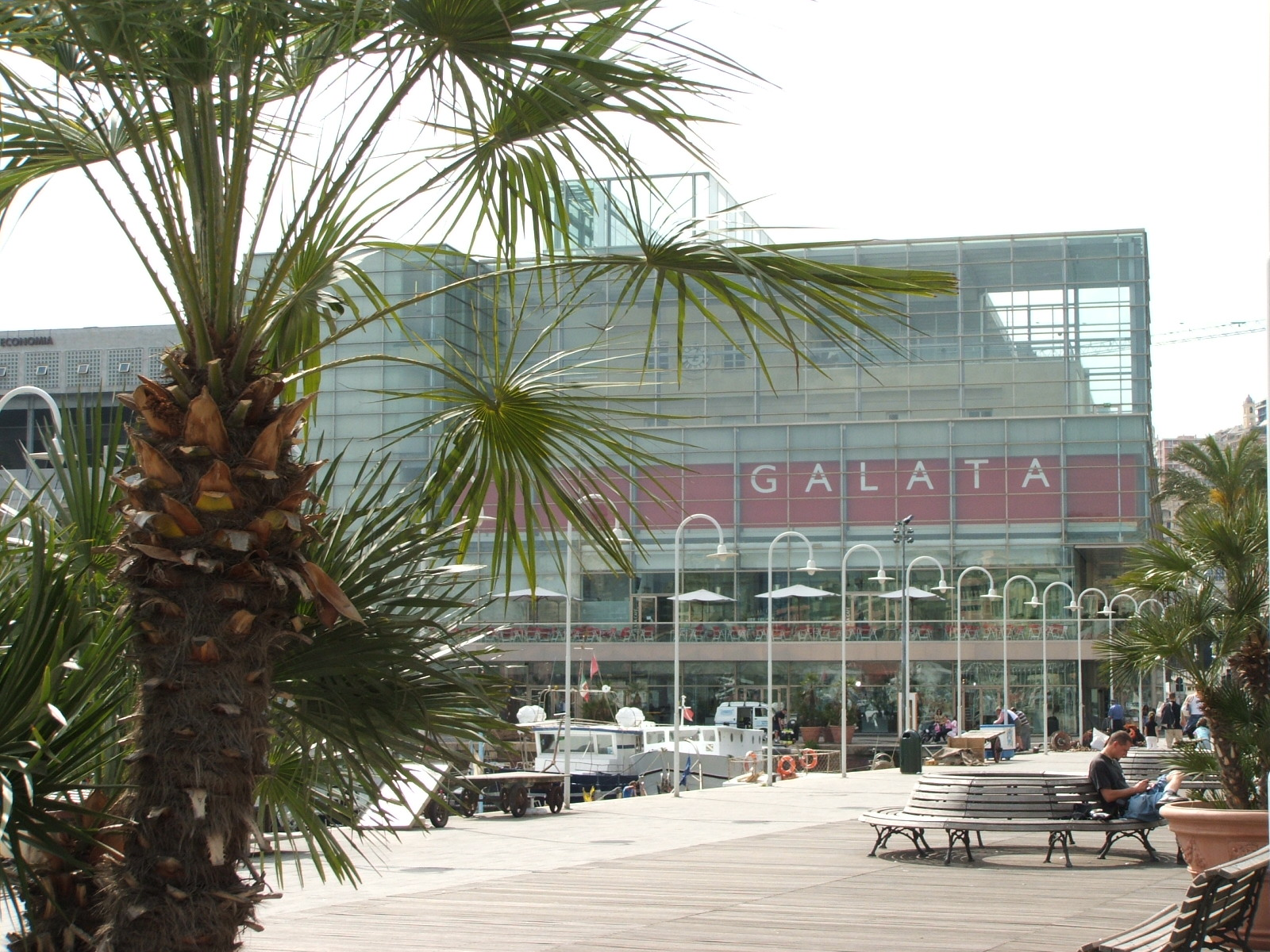 Genova, immagine dal porto antico, piazza Caricamento